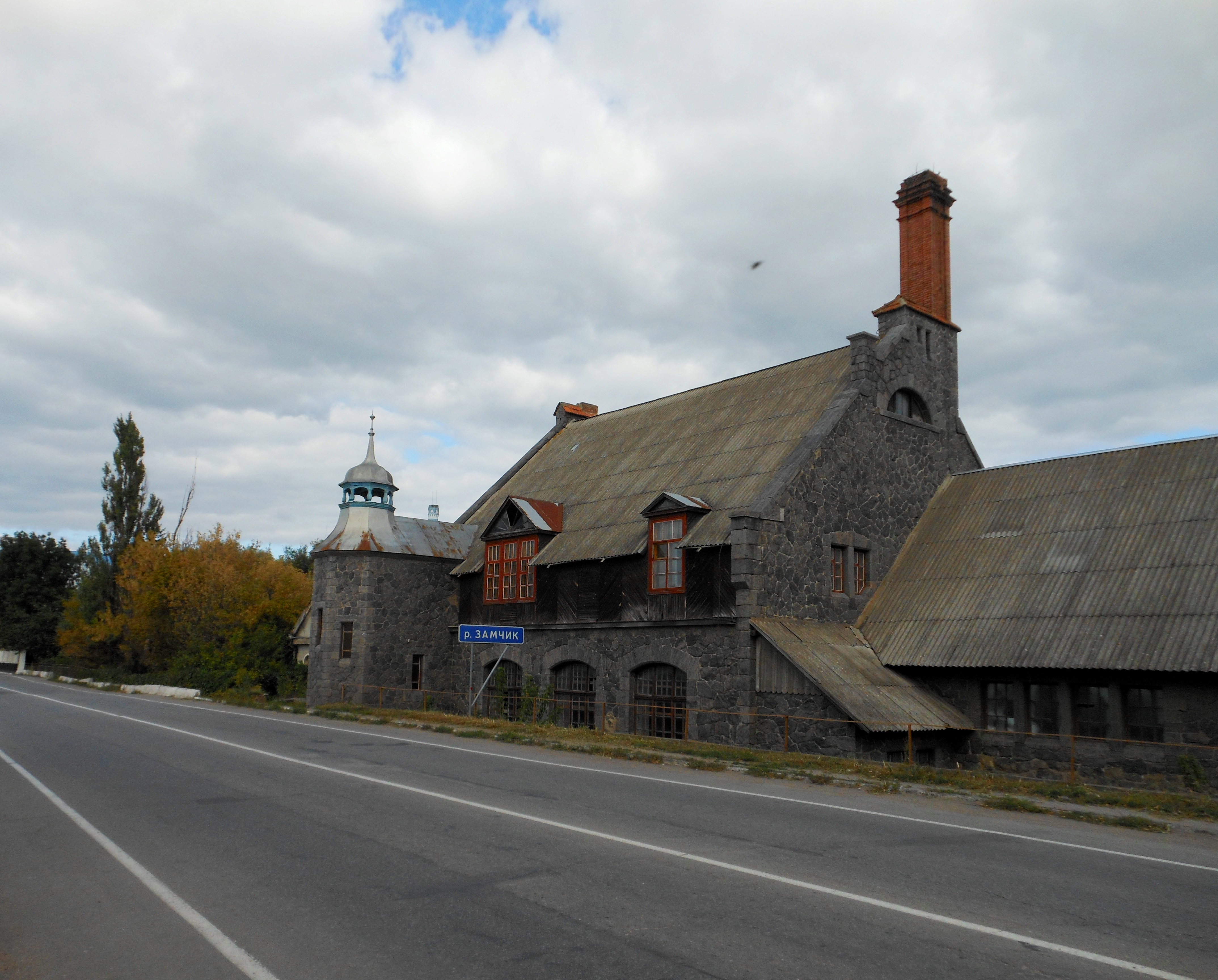 Електростанція та млин, Немирів, вул. Горького 26